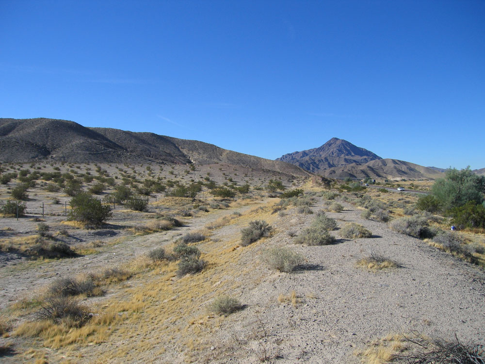 Nevados dykuma